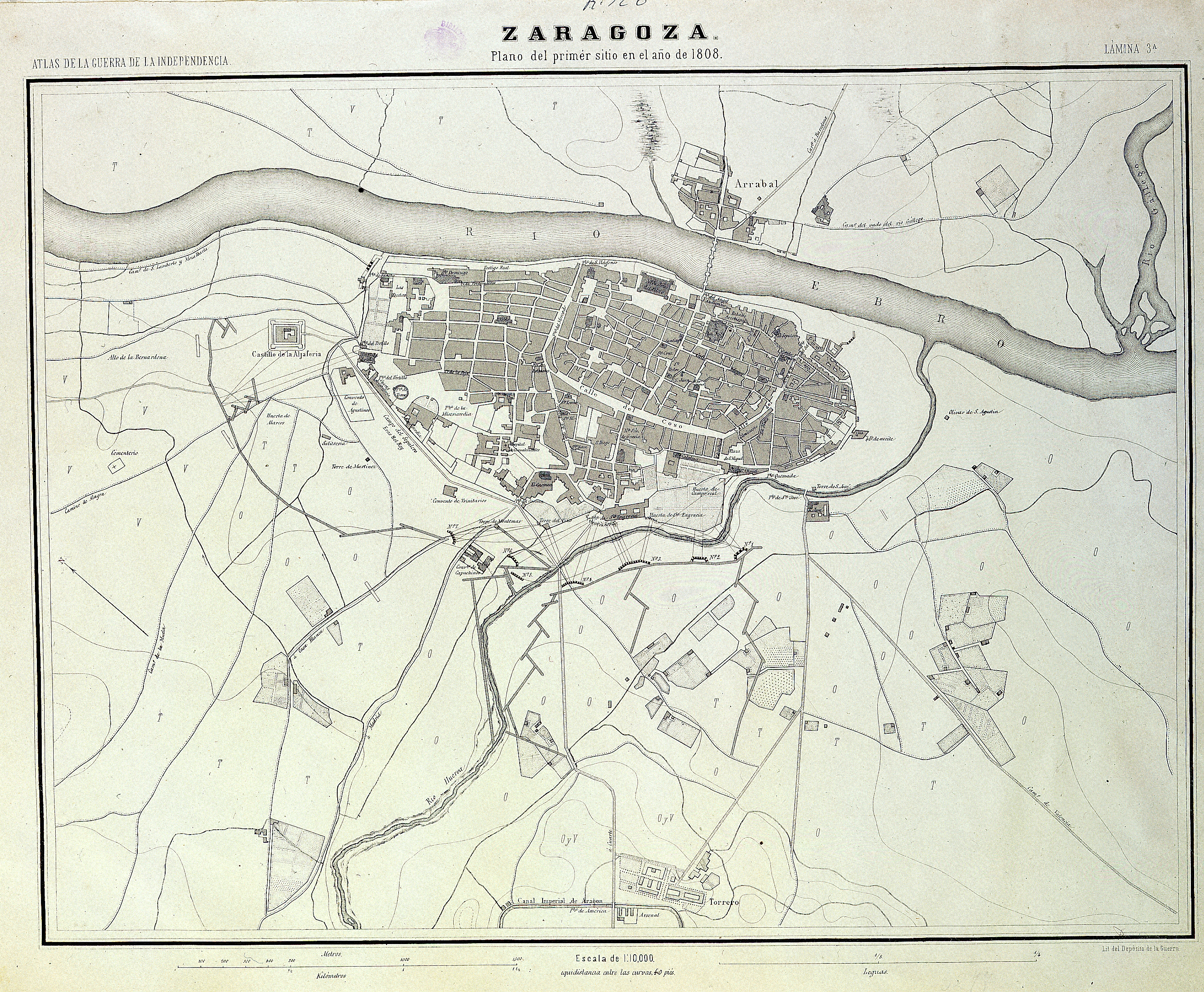 Plano del primer sitio de Zaragoza, Spain Separatas del atlas de la Guerra de la Independencia editadas por el Depósito de la Guerra, en 1868, como complemento a la obra del general don José Gómez de ARTECHE, "Guerra de la Independencia. Historia militar de España de 1808 a 1814".